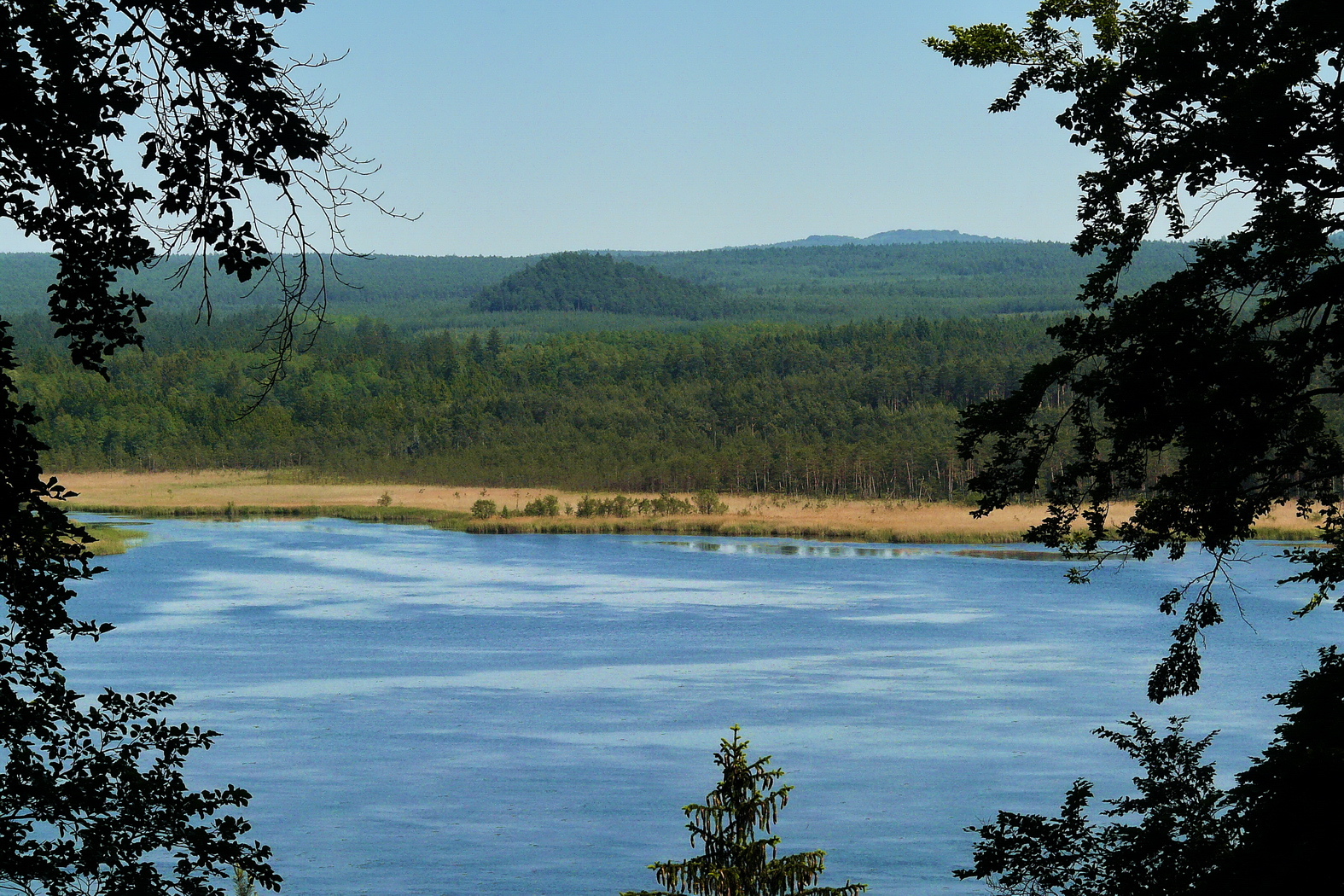 Břehyňský rybník z Mlýnského vrchu, za ním Zlatý vrch a vzadu Radechov